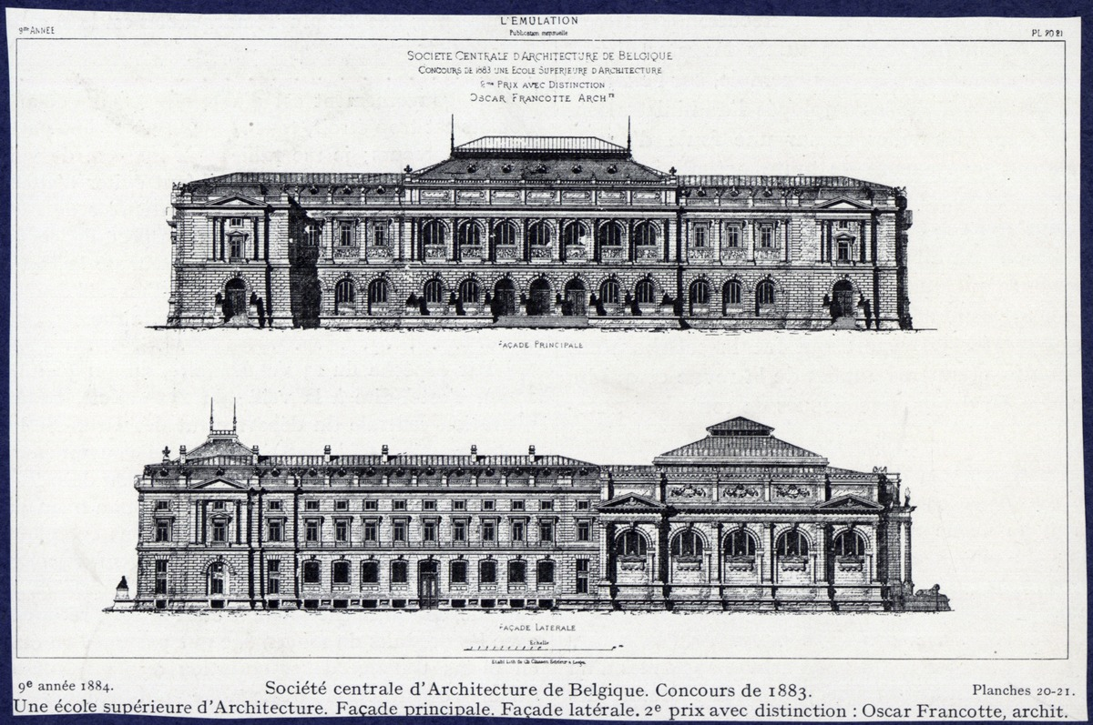 Concours de la Société centrale d'architecture de Belgique, 1883, 2e prix, Oscar Francotte, façade principale et latérale d'une école supérieure d'architecture